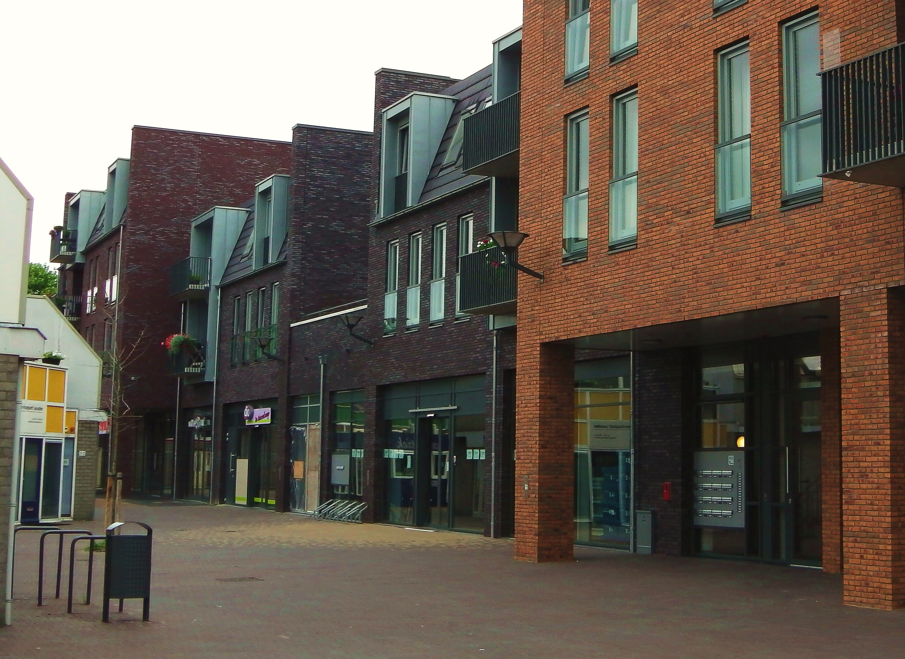 Winkelcentrum de Biezenkamp in het centrum van Leusden.